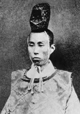 a Japanese man 三条実美 (Sanetomi Sanjo)